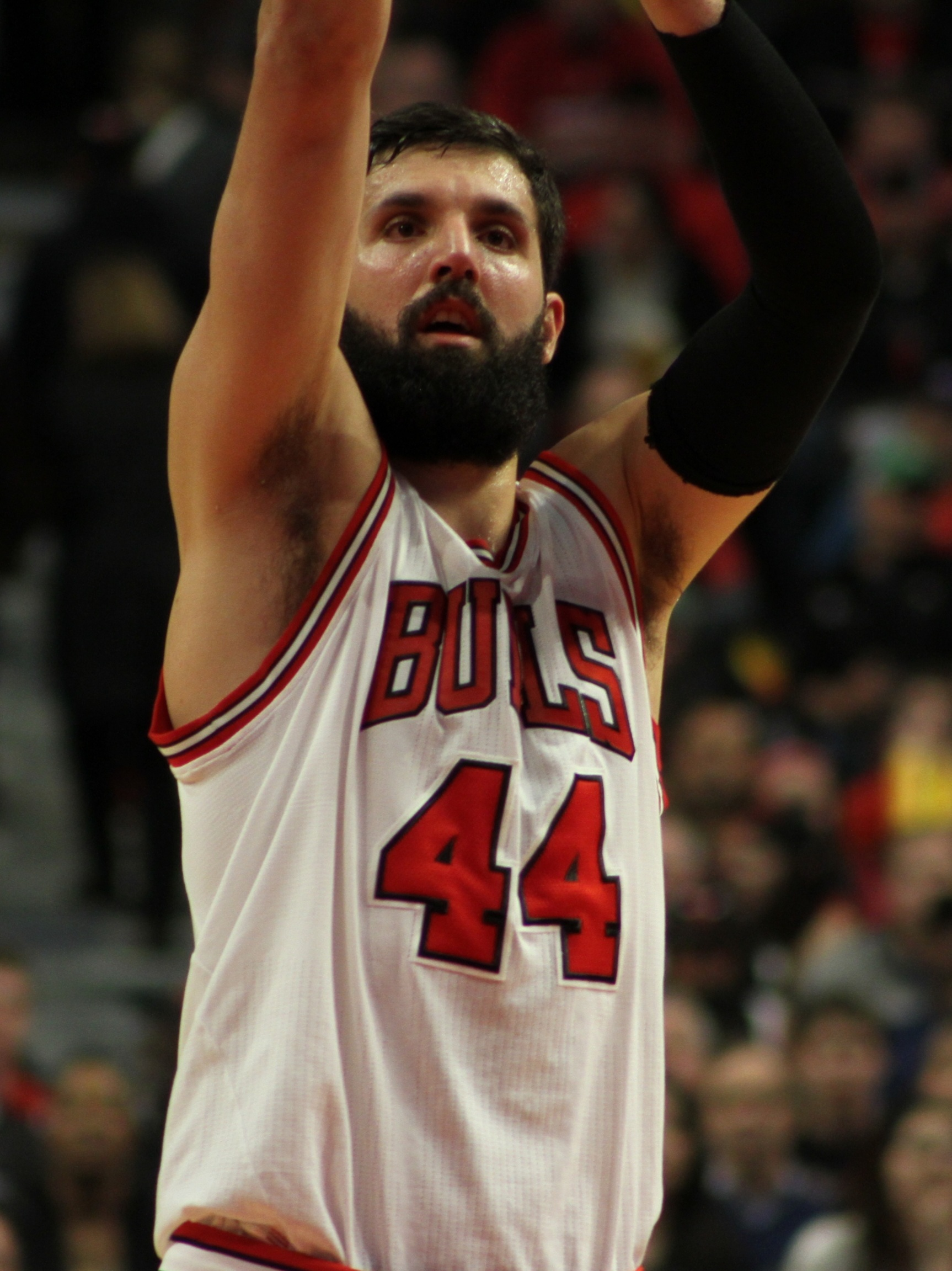 Bulls vs Pacers 03/18/2015